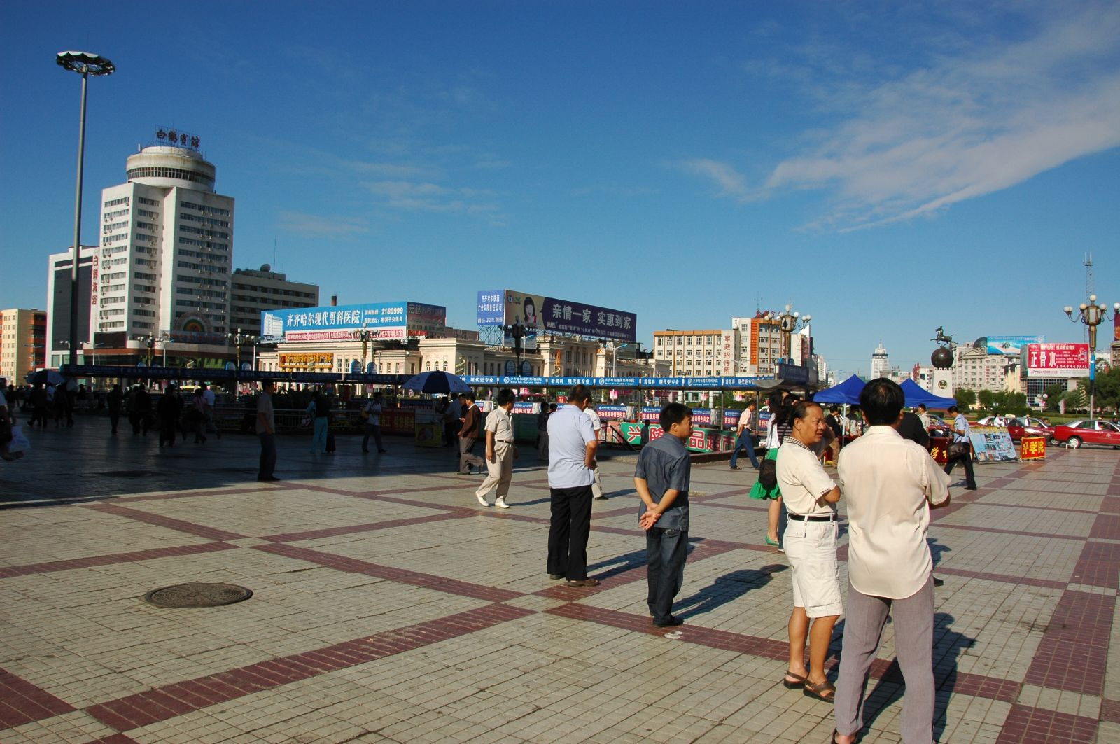 Qiqihar